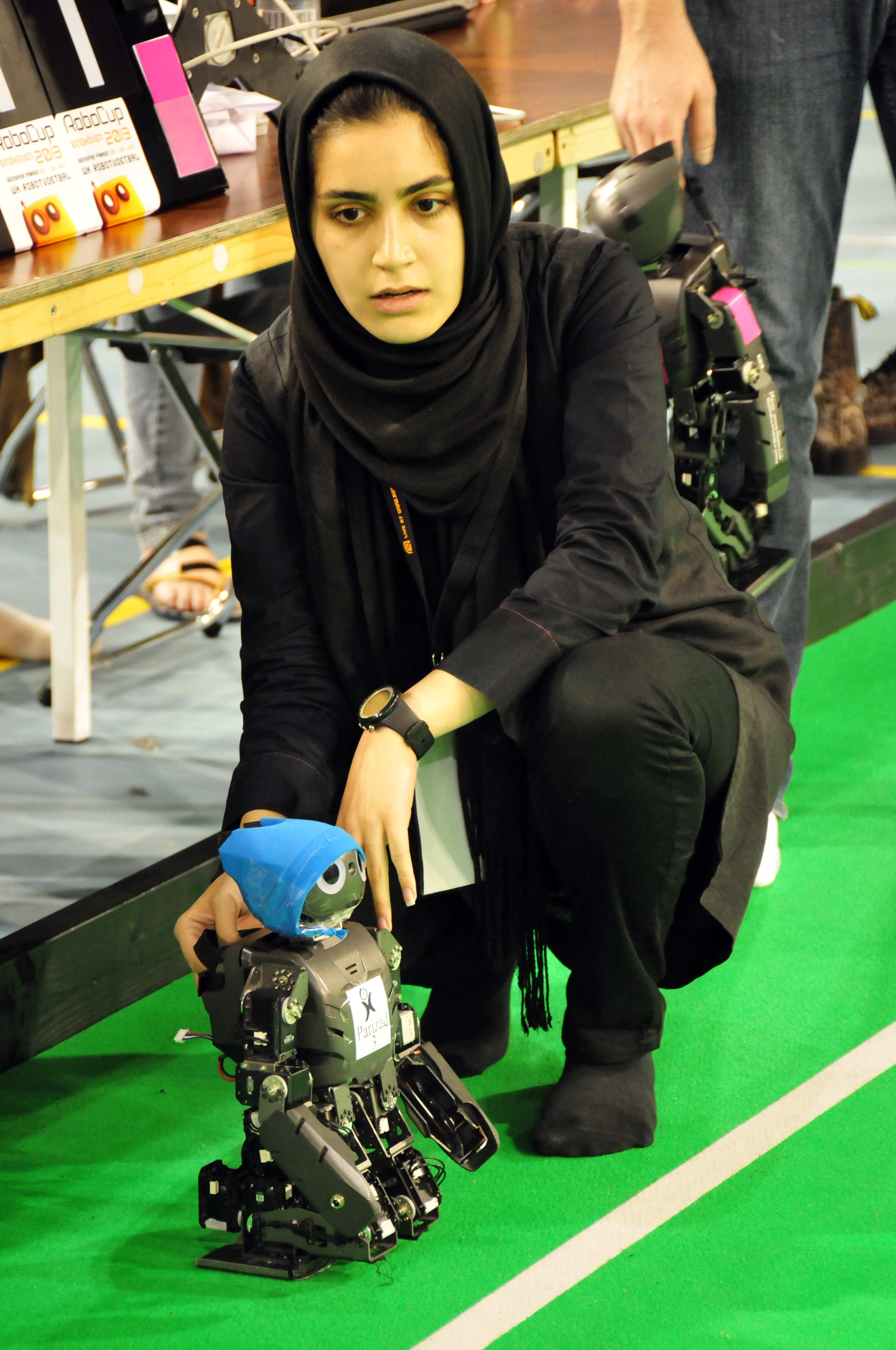 Eindhoven, Niederlande, Robocup 2013